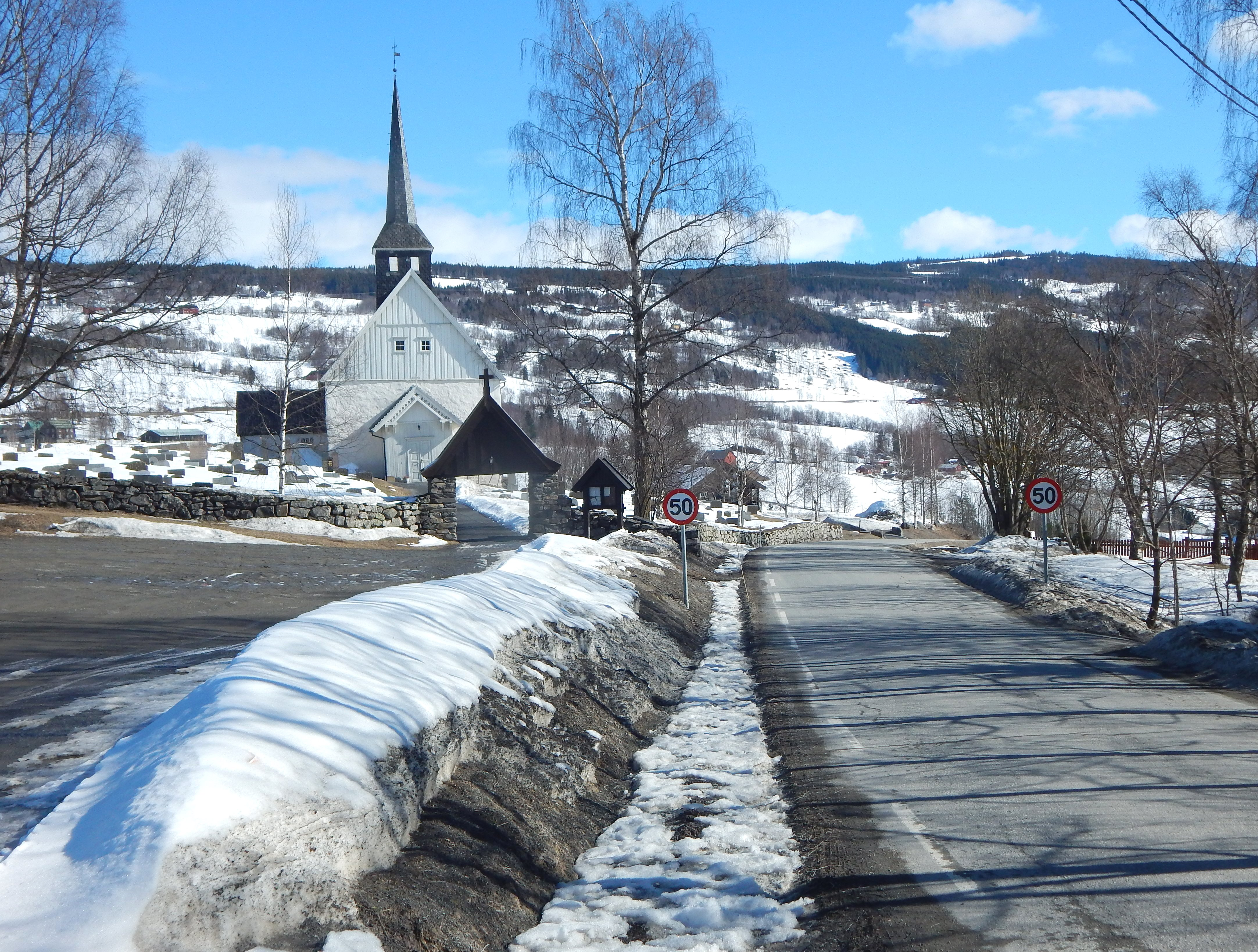 Holsbakkan (fylkesvei 2550, tidl. 341) ved Follebu kirke